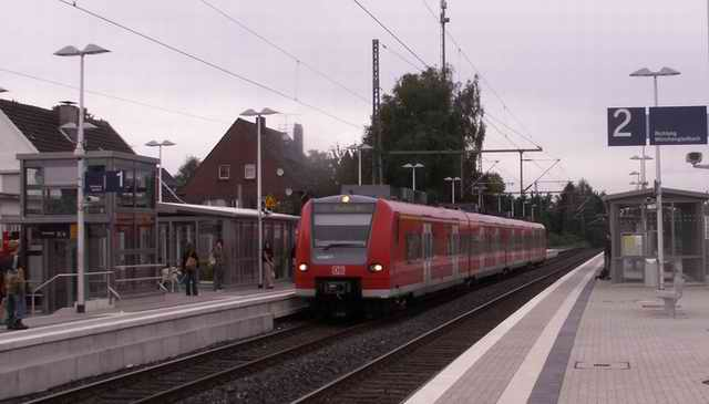 Der modernisierte Erklenzer Bahnhof